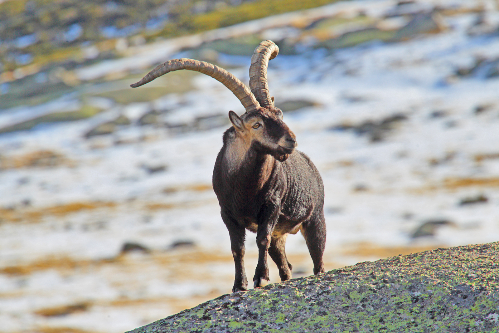 Cabra montés (Capra pyrenaica)